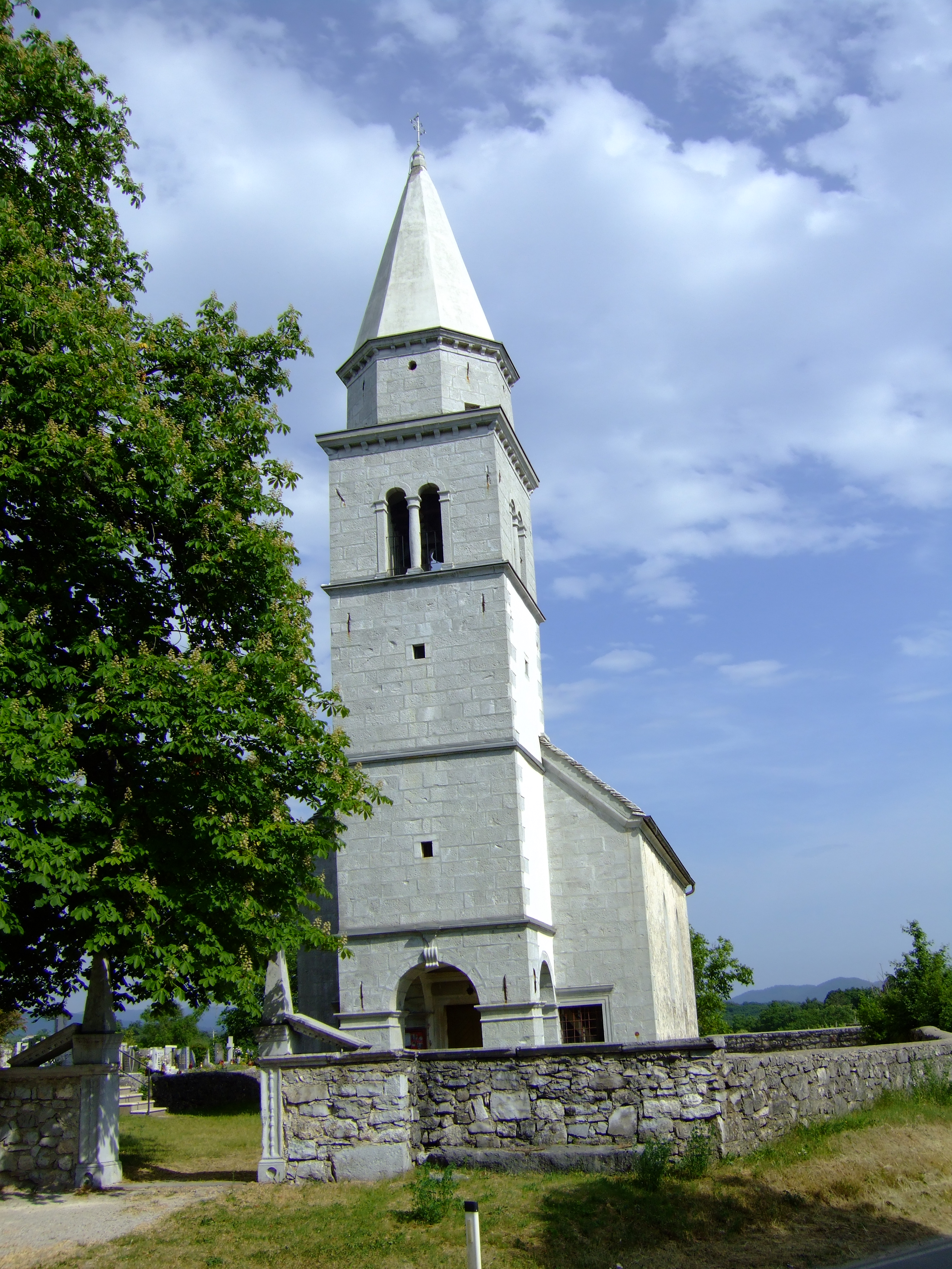 Chiesa di Croce di Tomadio - Sesana - Slovenia